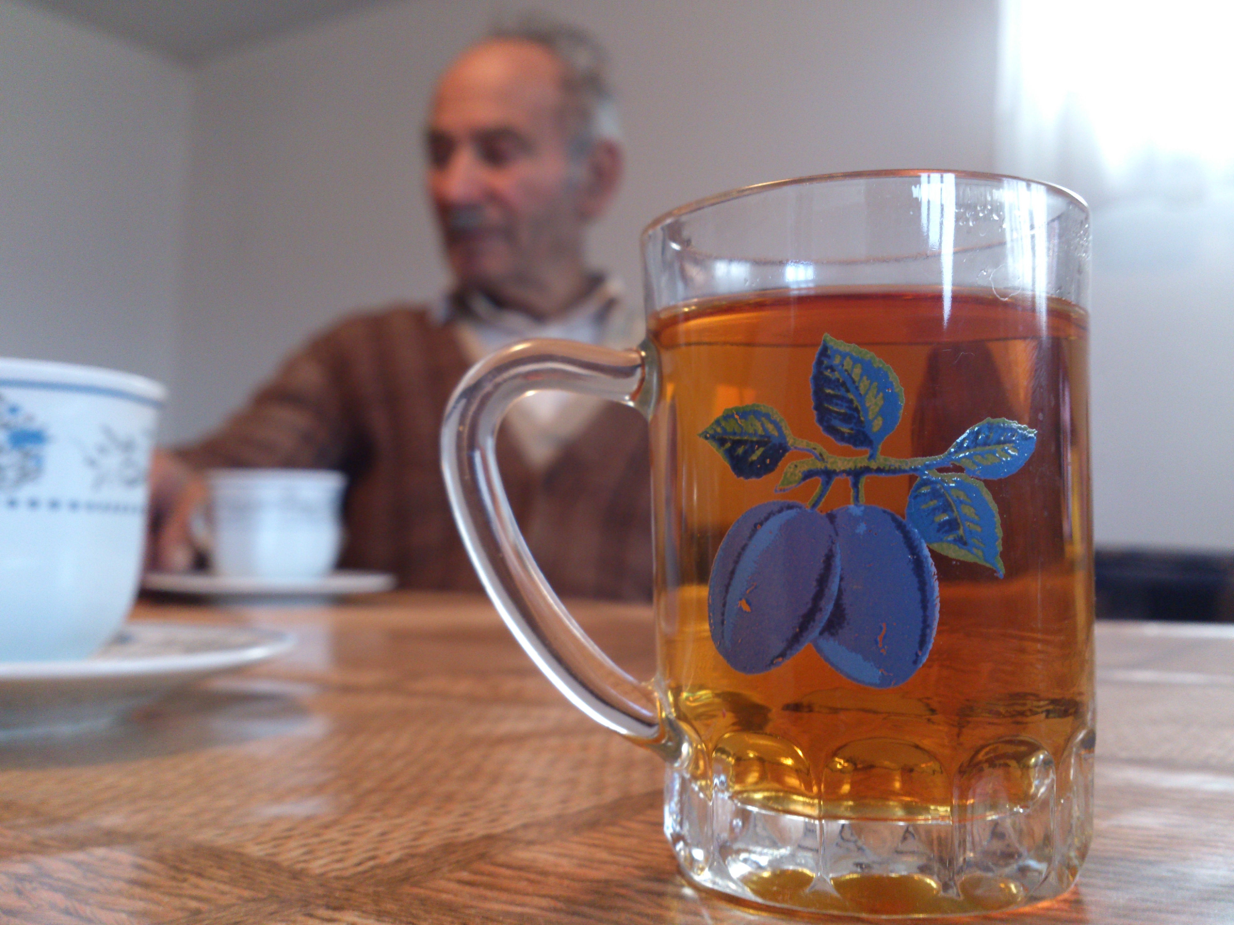 Vruća rakija, Šarani.